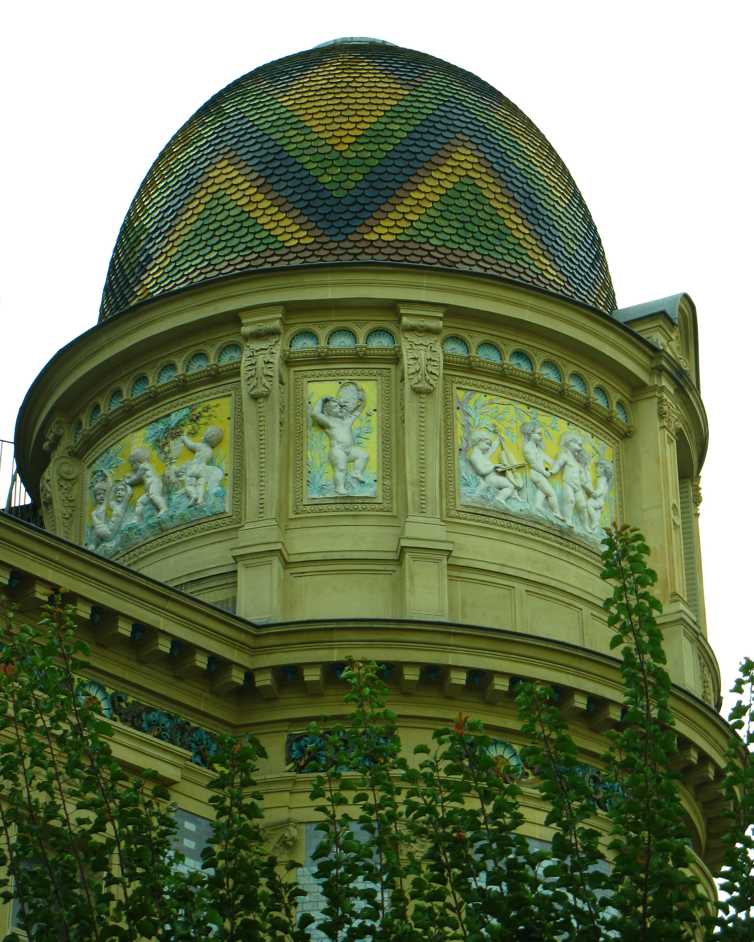 Tourelle avec frise sculptée et peinte de la maison Gilardoni à Thiais (94) .